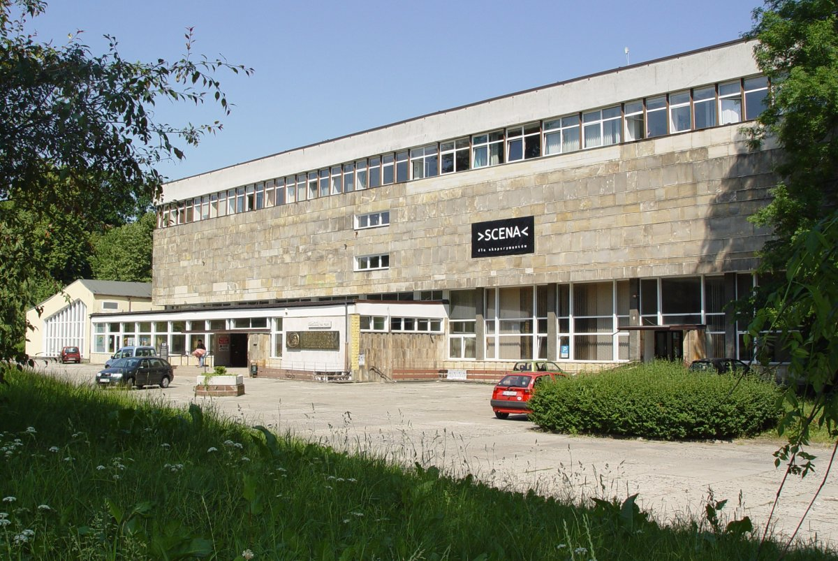 Biblioteka widziana z perspektywy parku.